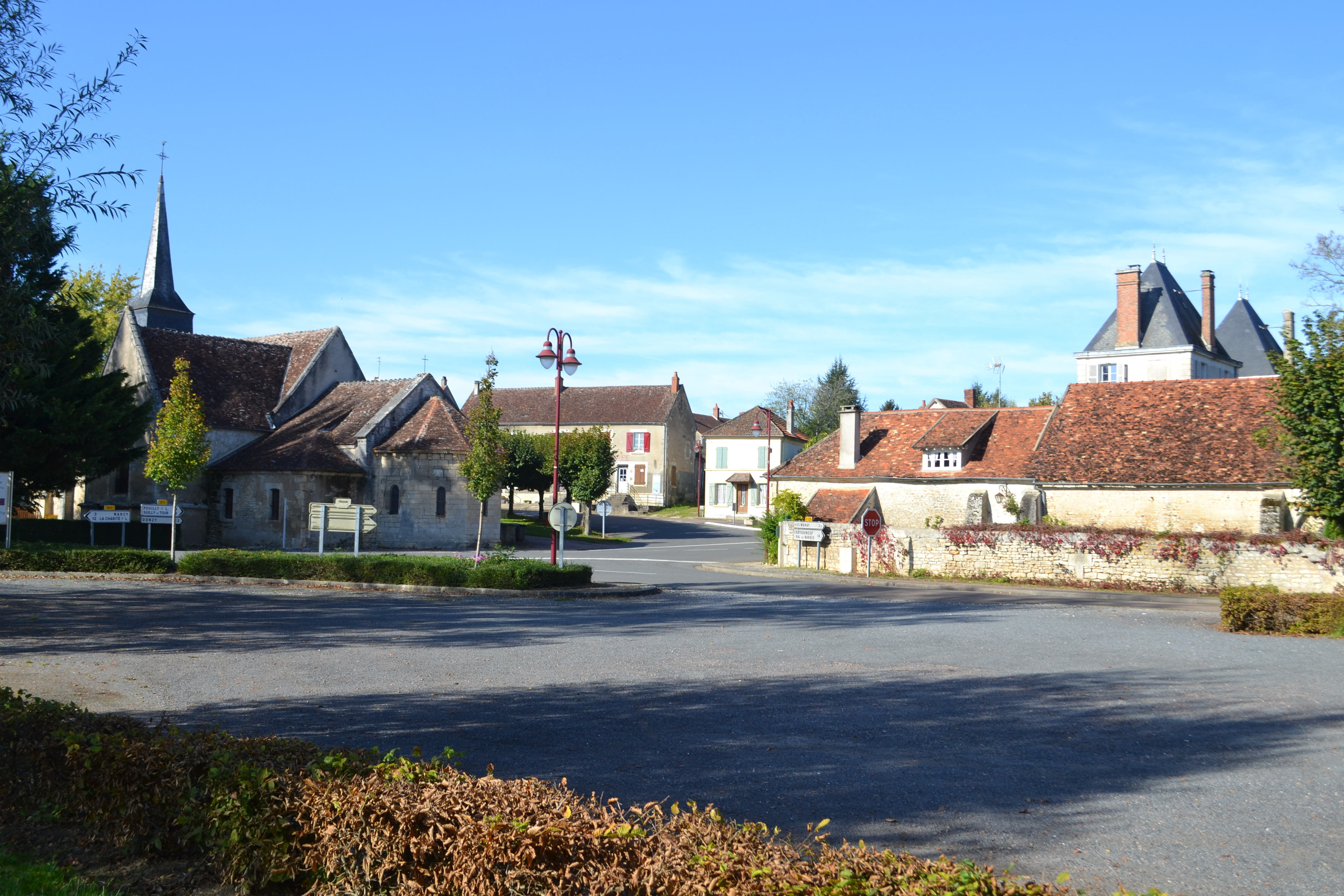 Bourg de Garchy (Nièvre).